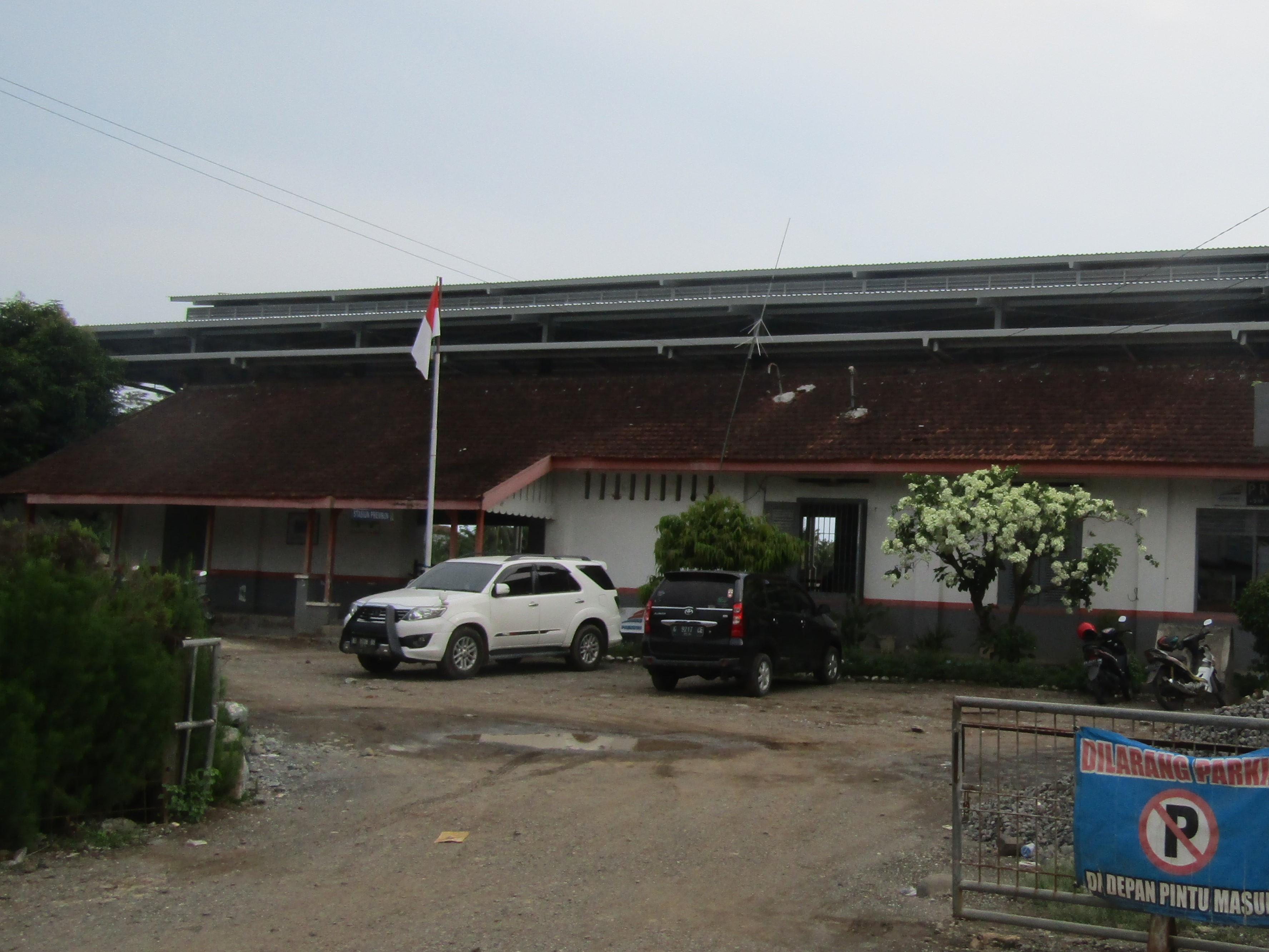 Tampak depan Stasiun Prembun, 2019